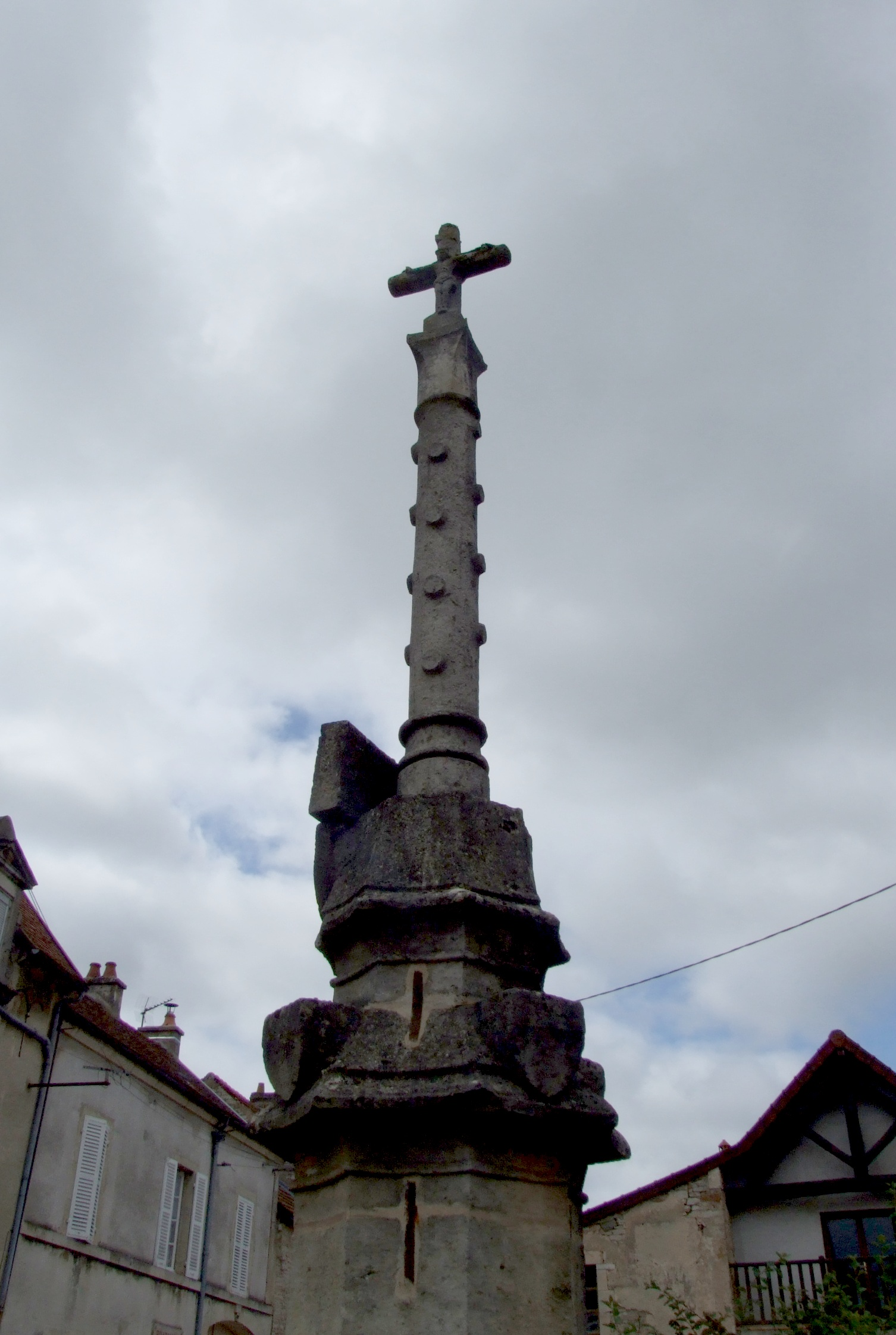 Croix de Baigneux-les-Juifs, Côte-d'Or, Bourgogne, FRANCE